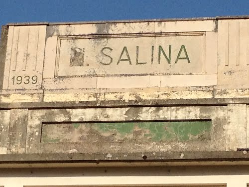 Anno 2012